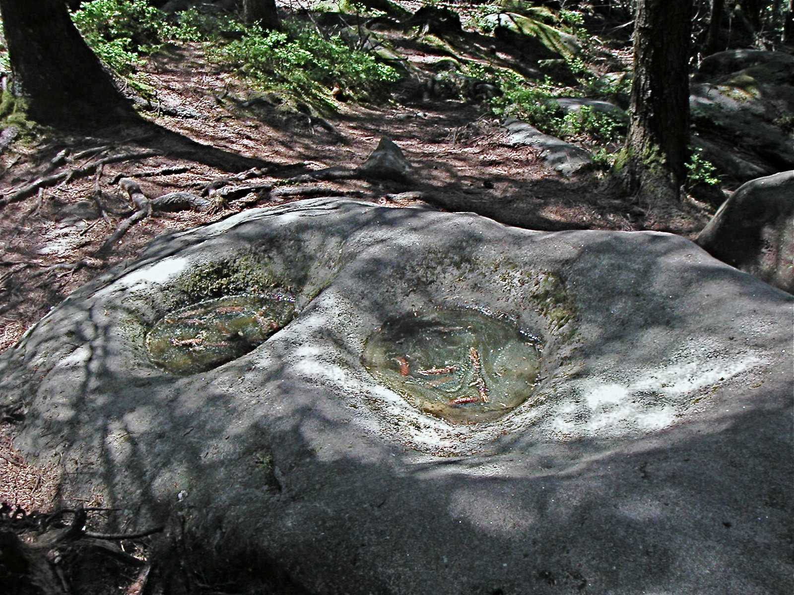 roche gréseuse comportant deux cupules remplies d'eau de pluie.